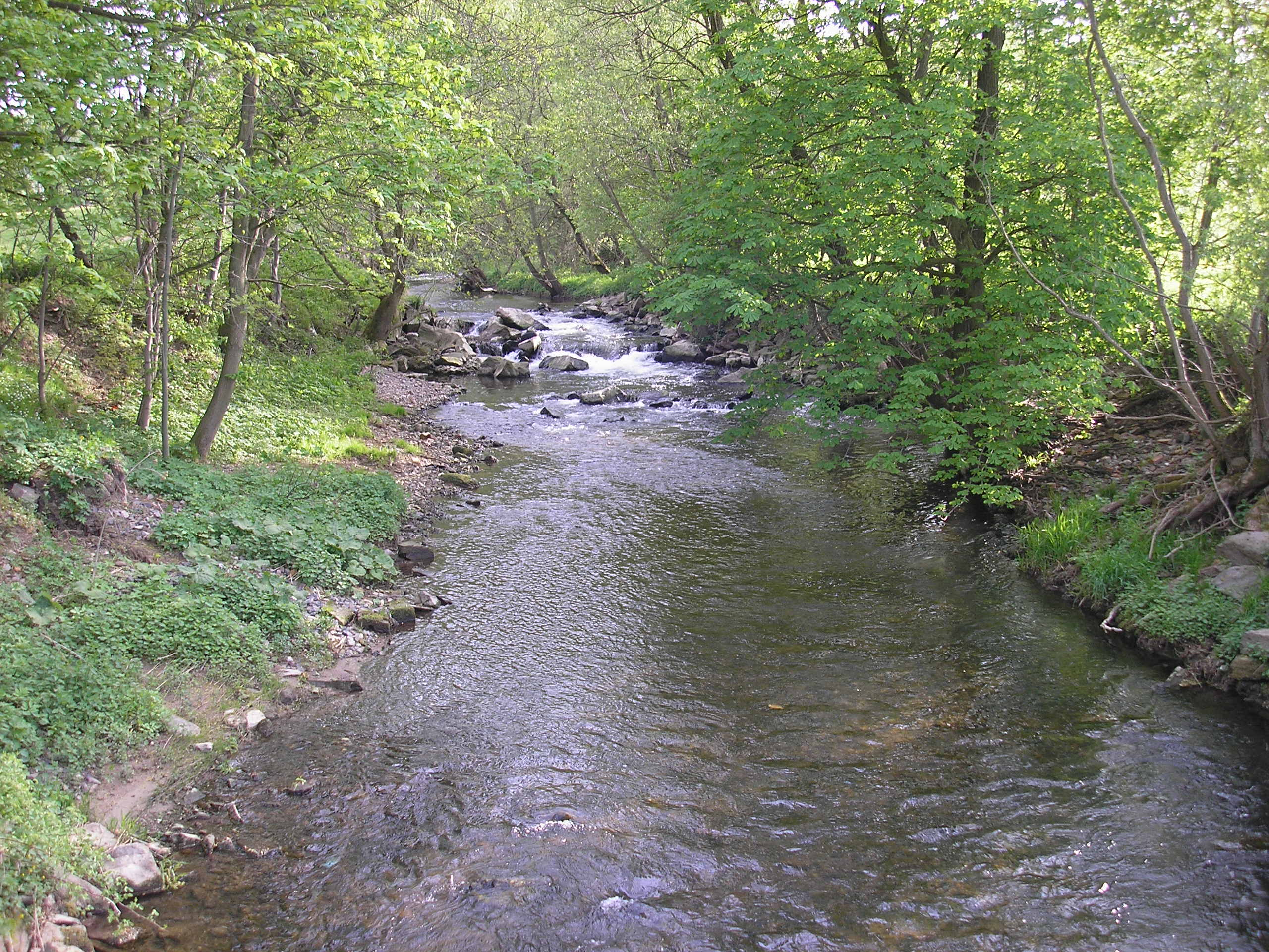 Die Ilm zwischen Langewiesen und Gräfinau-Angstedt (Thüringen).